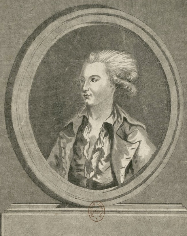 Rétaux de Villette, escroc et amant de la Comtesse de La Motte, un des protagonistes de l’affaire du collier. Estampe conservée à la BNF.